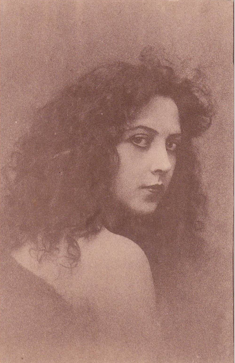 Portrait of Musidora